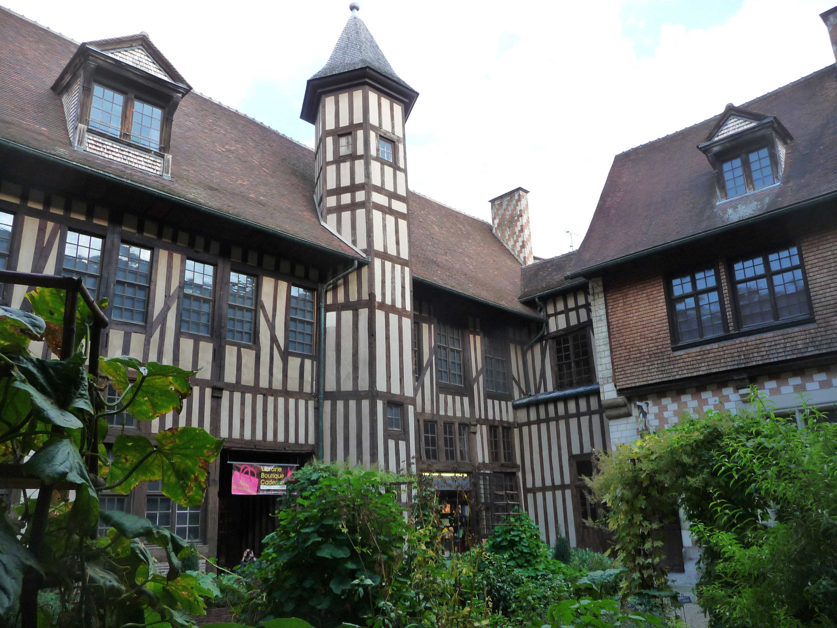 Dans la cour, l'aile gauche de l'édifice. Colonnes cannelées de pierre en bas, de bois en haut. .